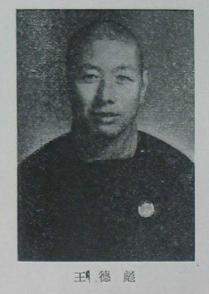 中文（台灣）: 中國人民政治協商會議第一屆全體會議代表